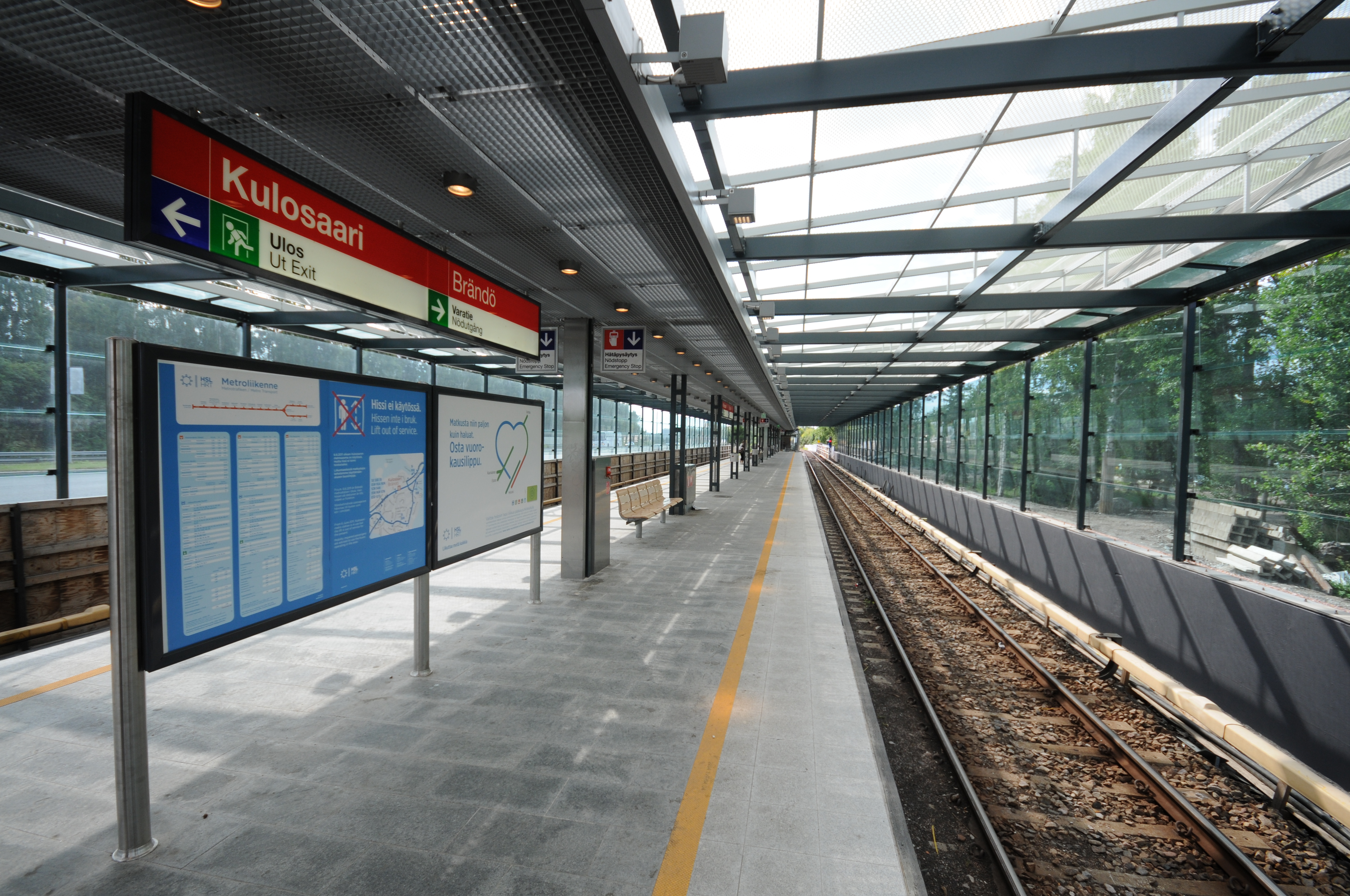 Helsinki